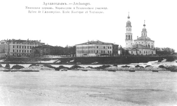 Панорама набережной Северной Двины Архангельска в 1912 году, Успенская церковь, мореходное и техническое училище